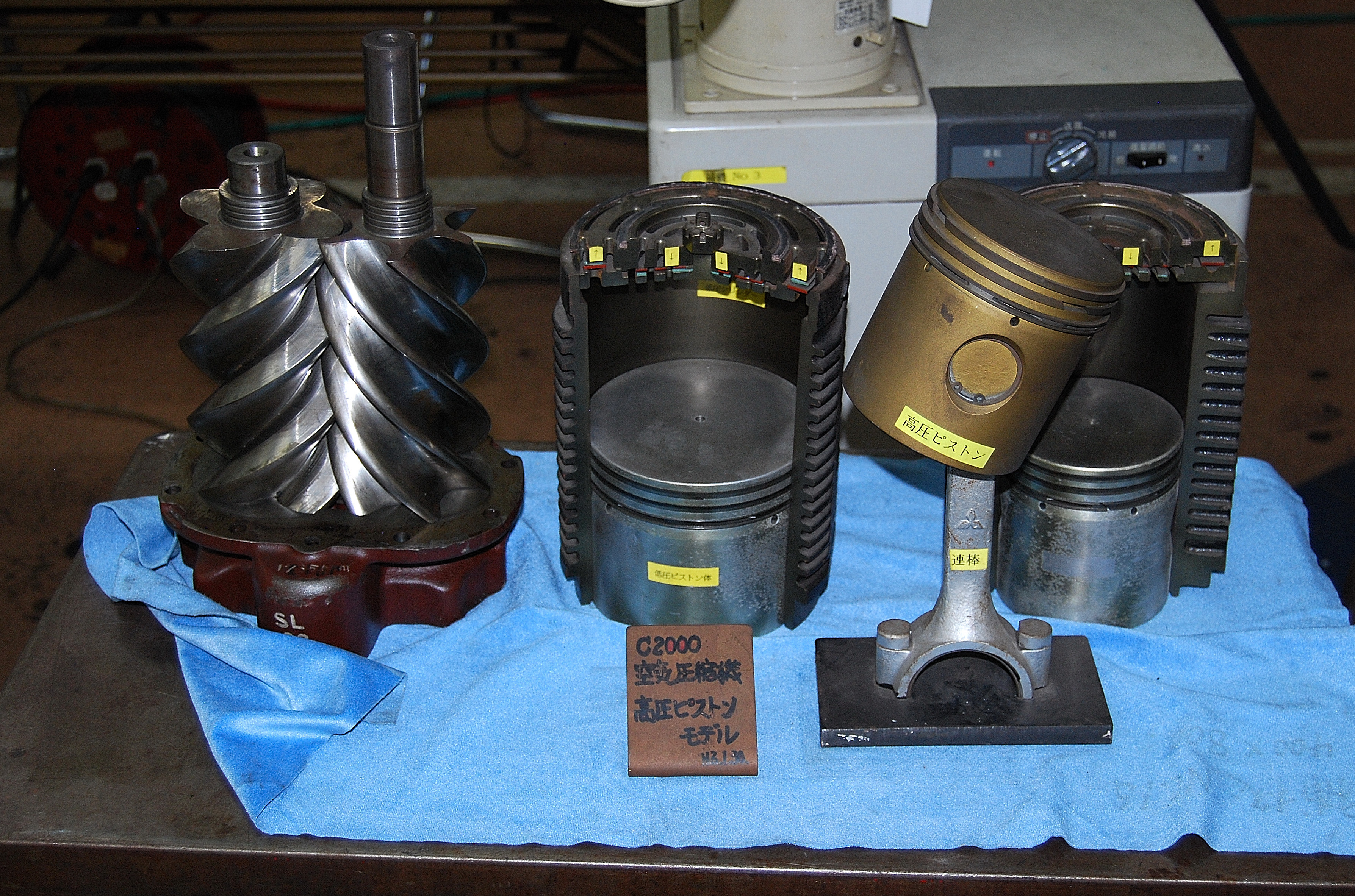 鉄道車両のレシプロ圧縮機に使用されているピストンとシリンダー（右側）とスクリュー圧縮機に使用されているツインスクリュー（左側）（夏休みフェアイベントでのJR東京総合車両センター公開時に撮影）